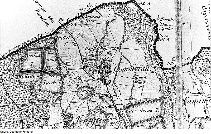 Original image description from the Deutsche Fotothek Königswartha-Commerau. Oberreit, Sect. Bautzen, 1844/46